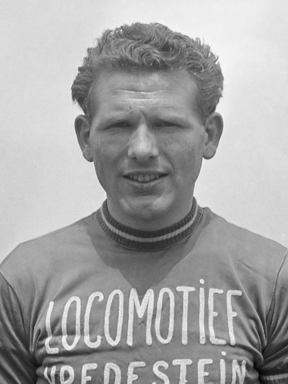 Nederlandse Wielrenners Tour de France . W. van Dongen 4 juli 1956